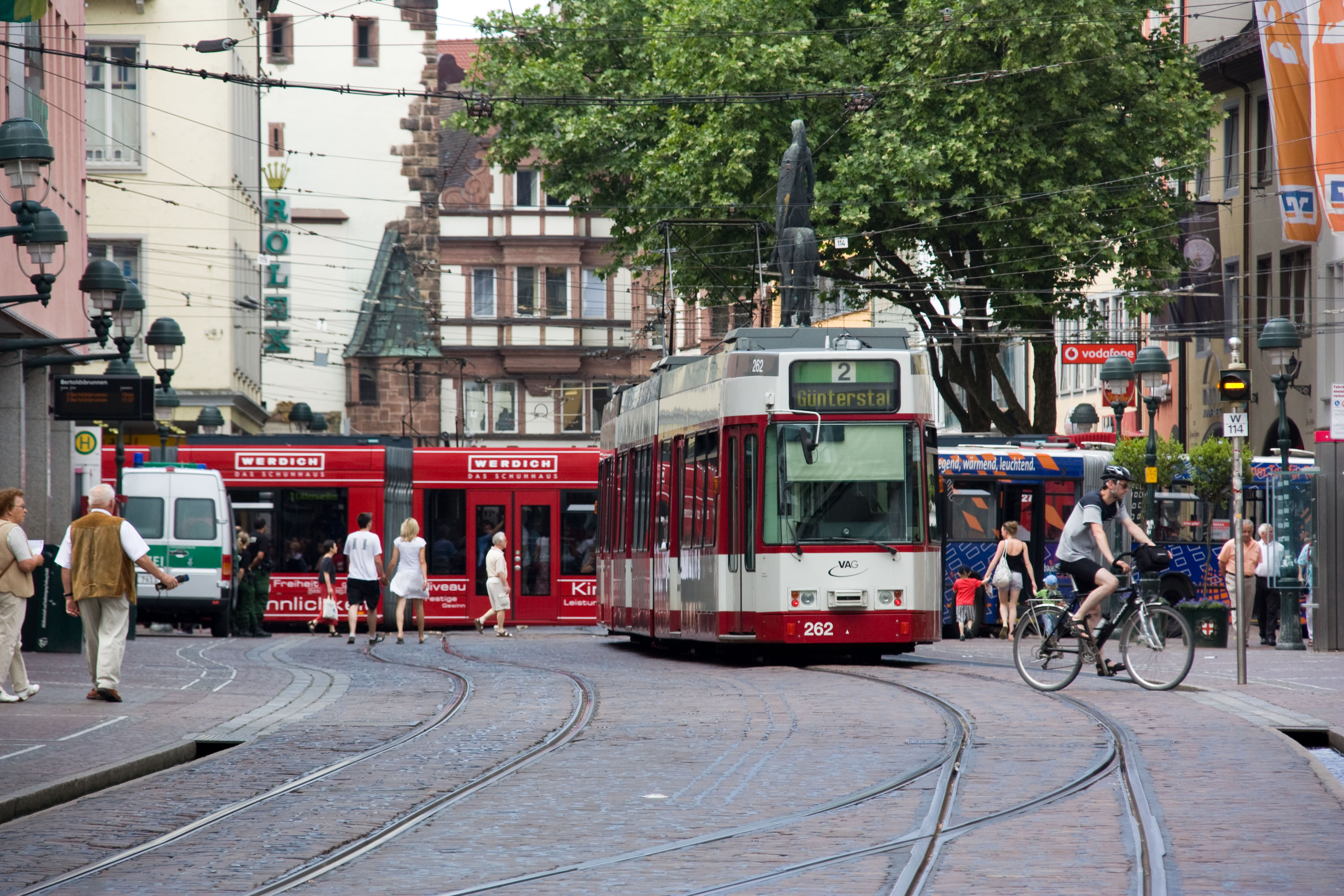 Tramway de Fribourg. Fribourg-en-Brisgau. Allemagne.